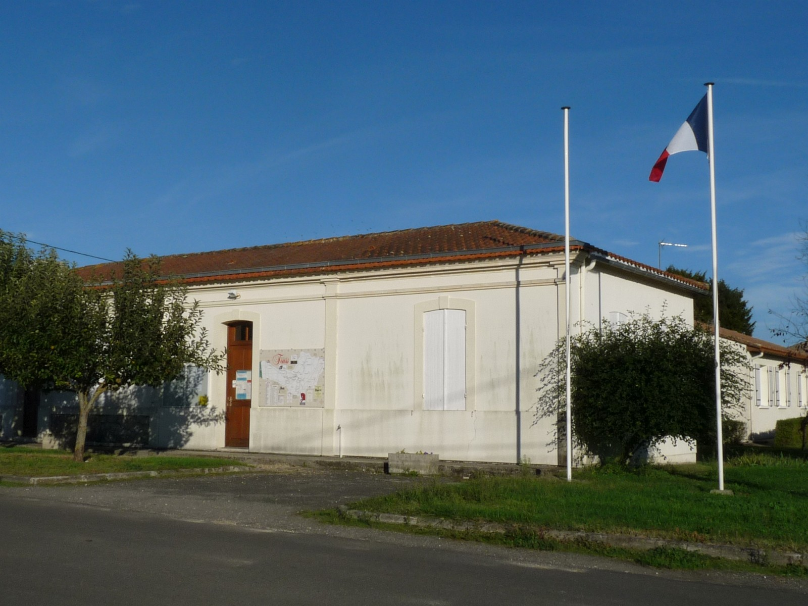 Mairie de Fours, Gironde, France